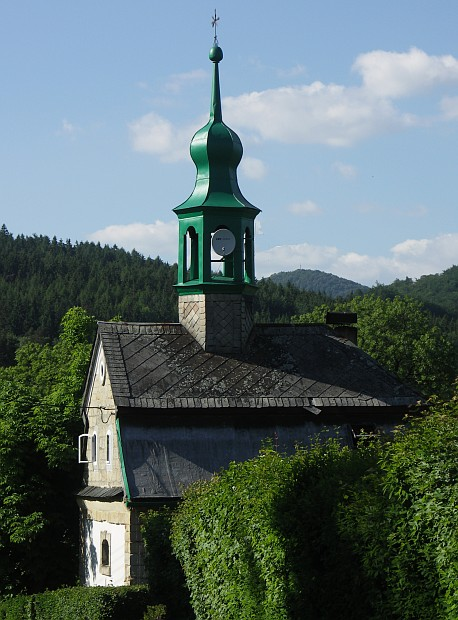 Bývalá kaple v Naději (část města Cvikov, okres Česká Lípa)